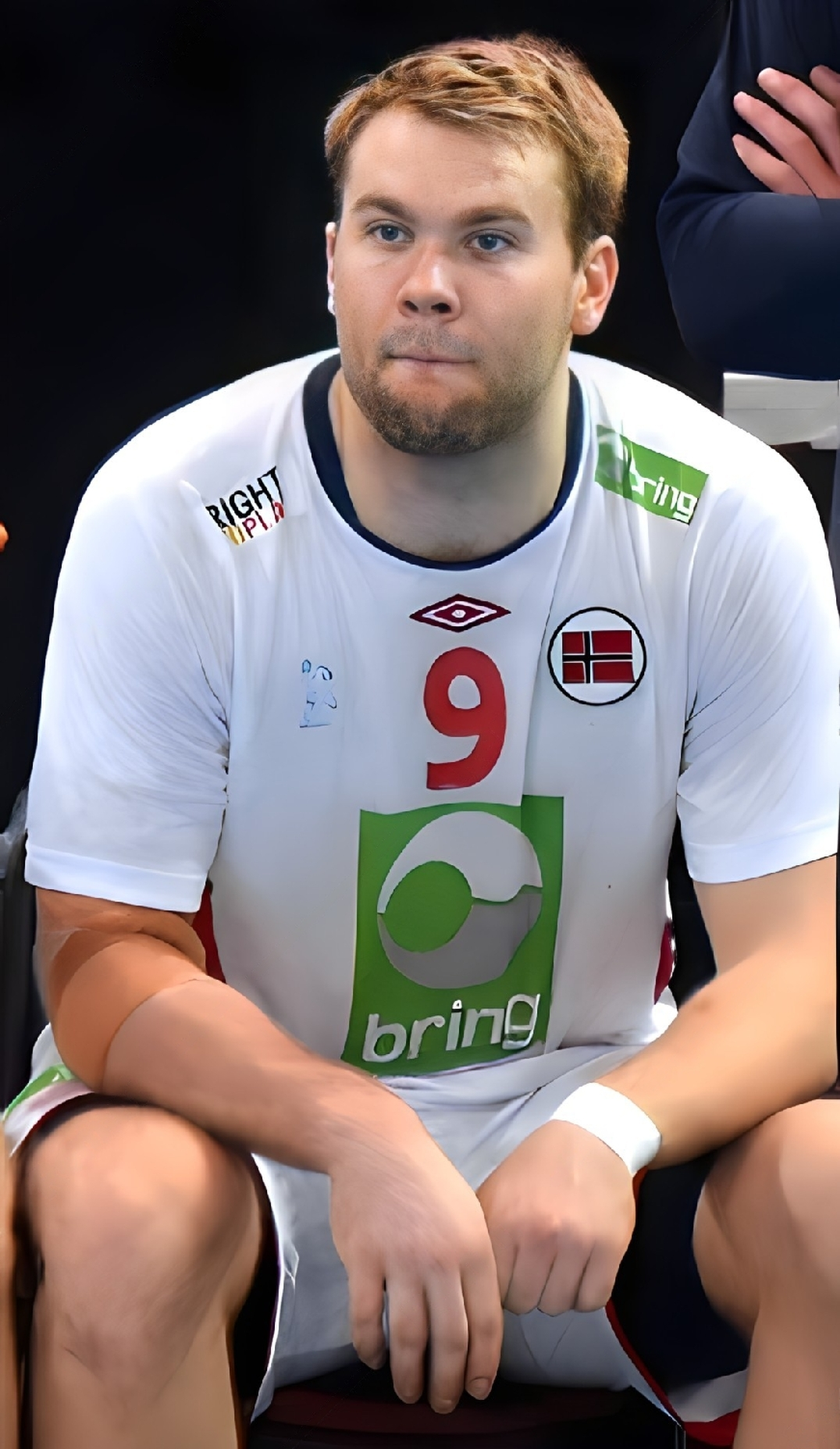 Le 10 janvier 2016 lors du match Norvège / Qatar durant la Golden League à l'AccordHotel Arena (Paris). Magnus Gullerud-Petter Øverby-Christian Berge